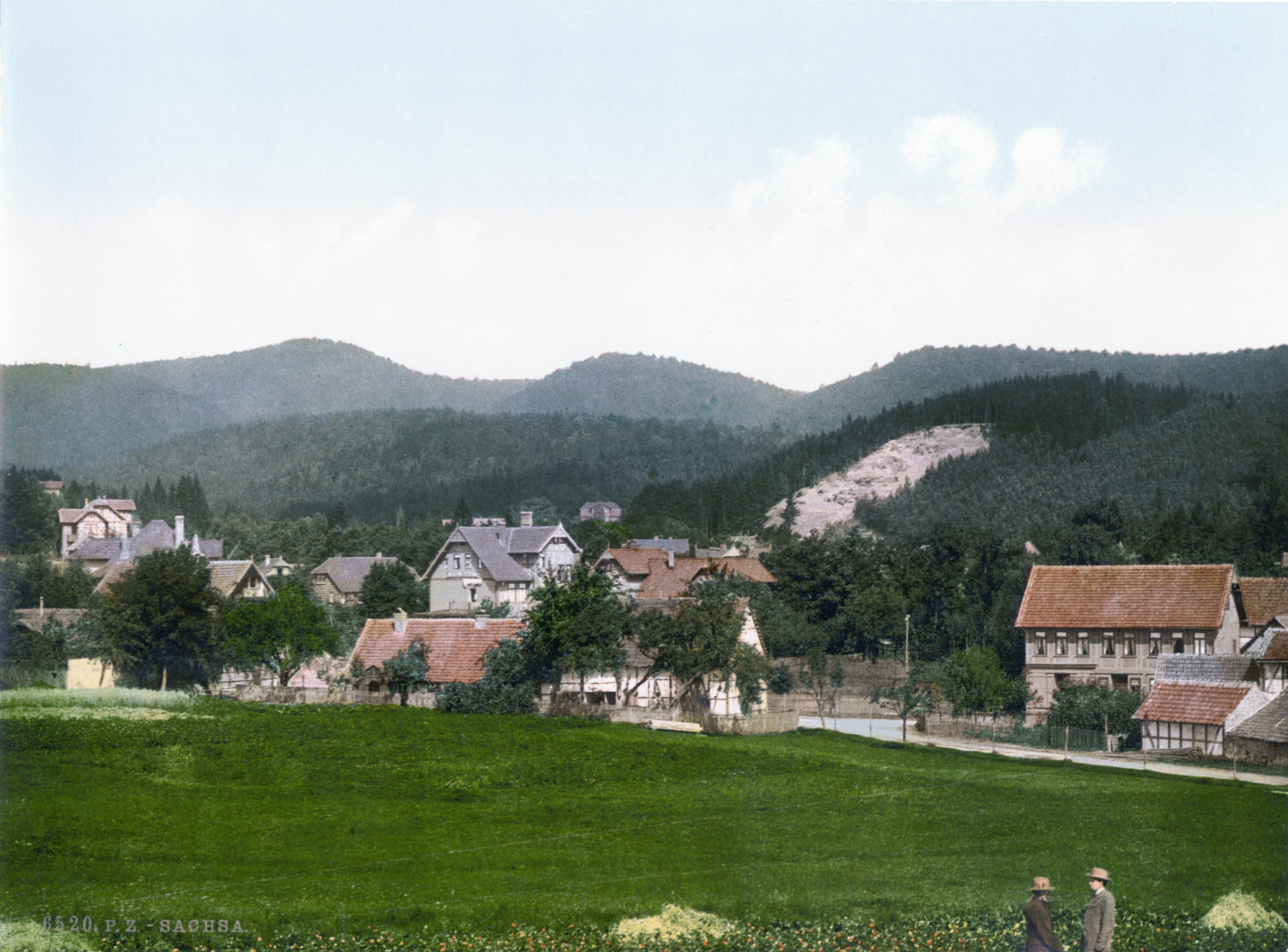 Sachsa